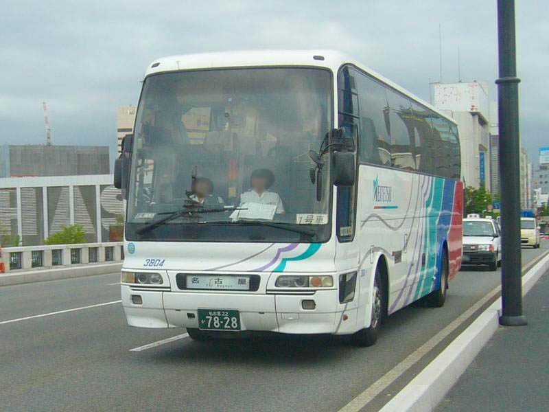 登録番号 名古屋22か78-28 名鉄バス所属 車番3804 名古屋 - 新潟線用 2007年9月8日 万代橋にて撮影 撮影者 Tokatsu kokubu